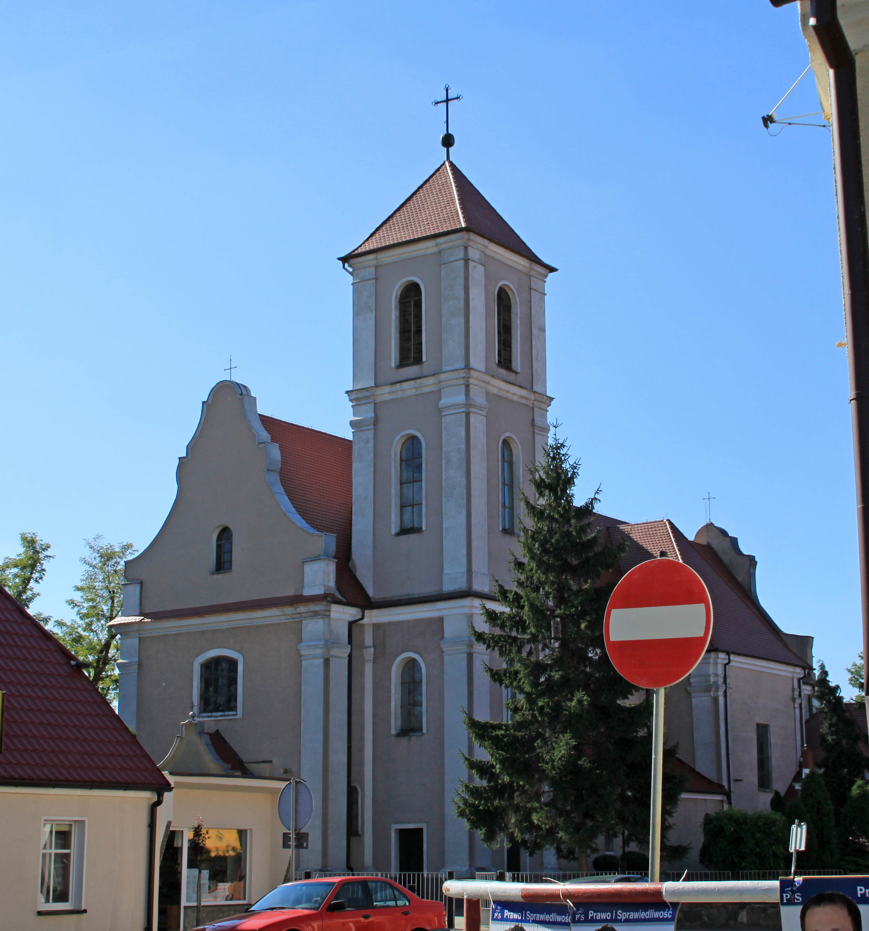 Kościół Najświętszej Maryi Panny Wniebowziętej i św. Mikołaja w Książu Wielkopolskim.